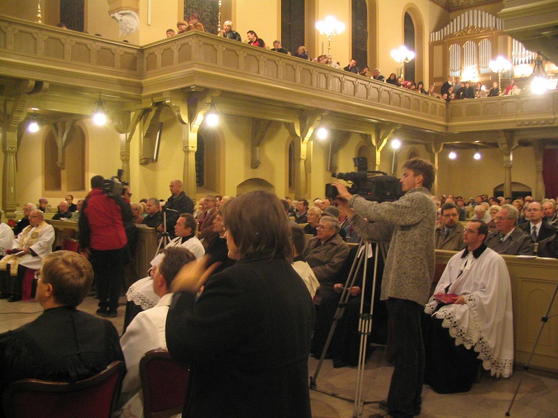 Wręczenie "Śląskiego Szmaragdu" w 2006 r. w kościele ewangelickim w Katowicach